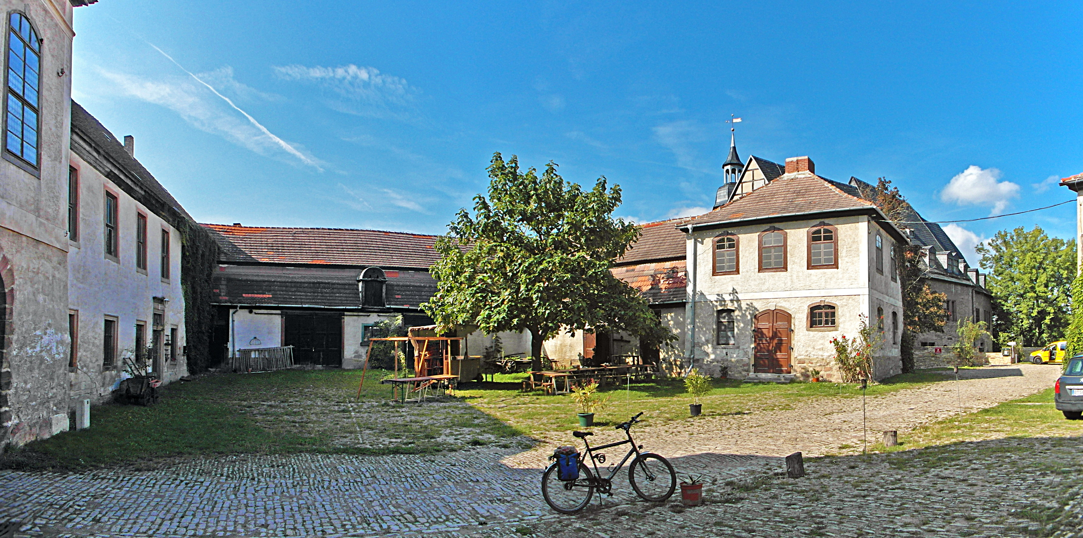 Vorburg und vorderer Burghof der Burg Allstedt (2015)